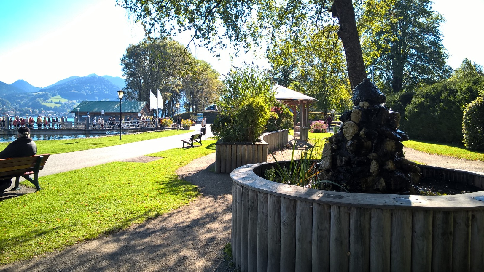 Bad Wiessee Louis Braille Duft- und Tastgarten an der Seepromenade mit Schifffahrtsanlegestelle Ortsmitte im Hintergrund